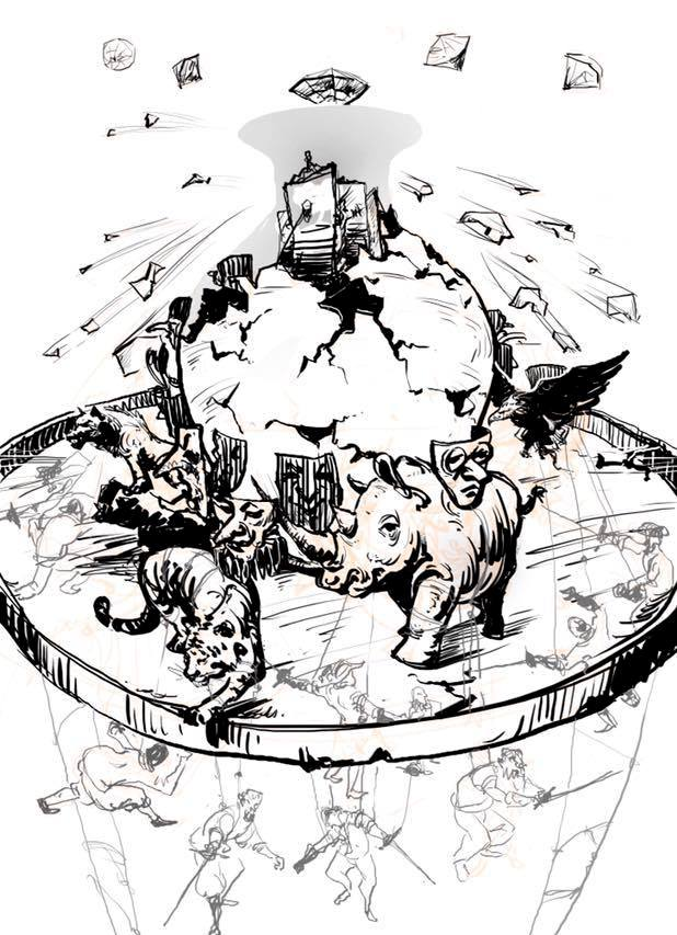 Модель системы Неаполитанской школы фехтования со всеми ее логическими моделями